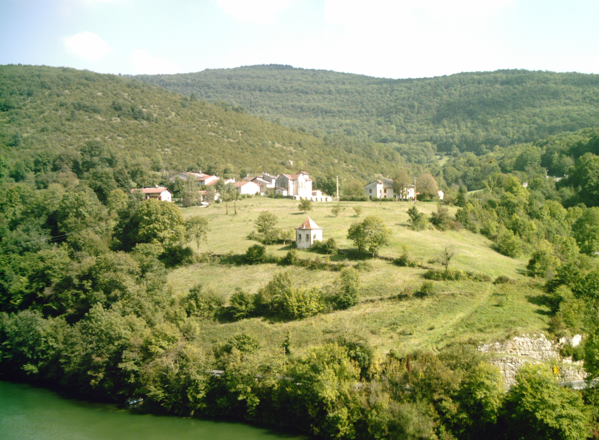 Vue générale de Serrières-sur-Ain. -Au premier plan la rivière d'Ain -Au second, Serrières -Au dernier plan, les monts Berthiand